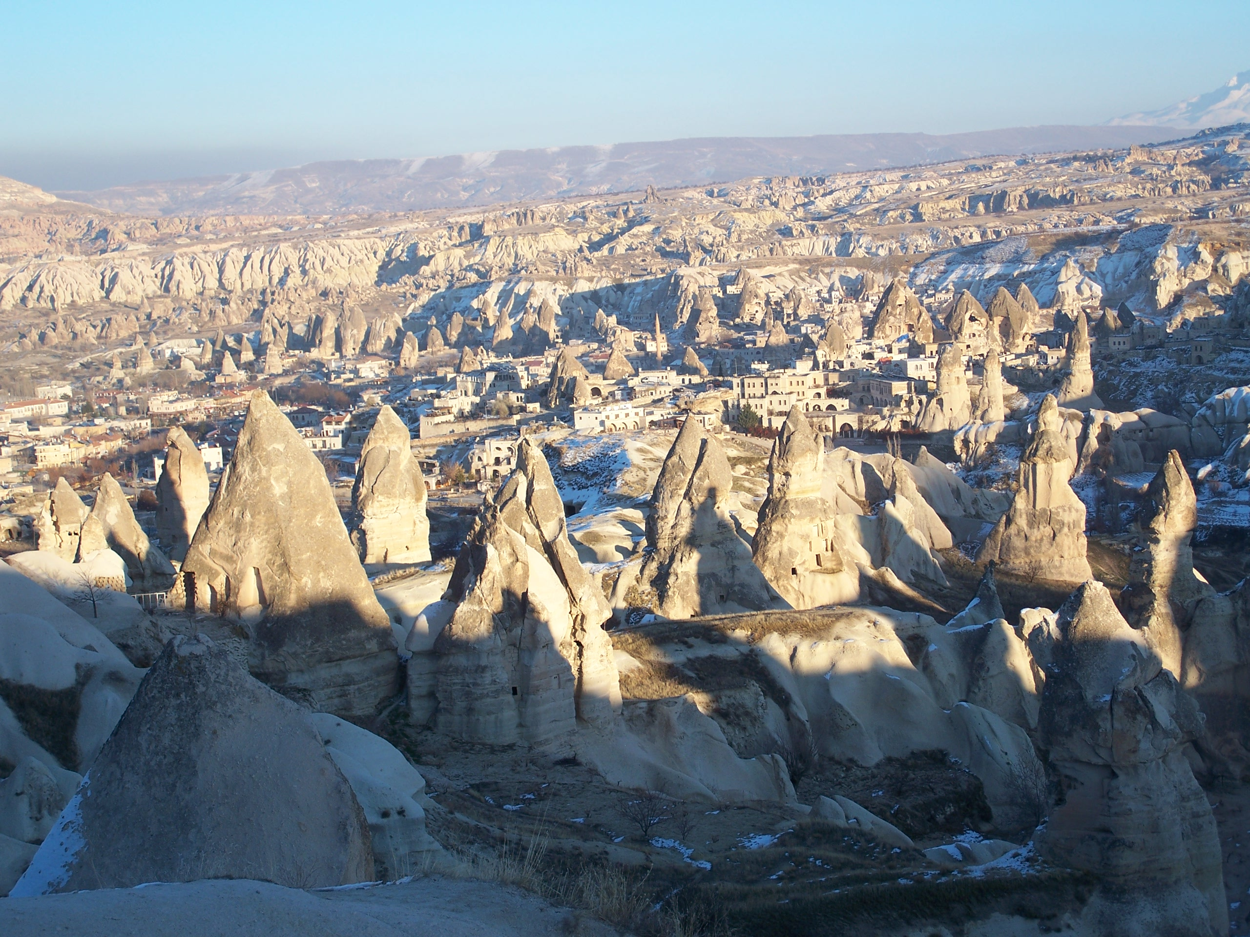 Capadocia (Turquia)